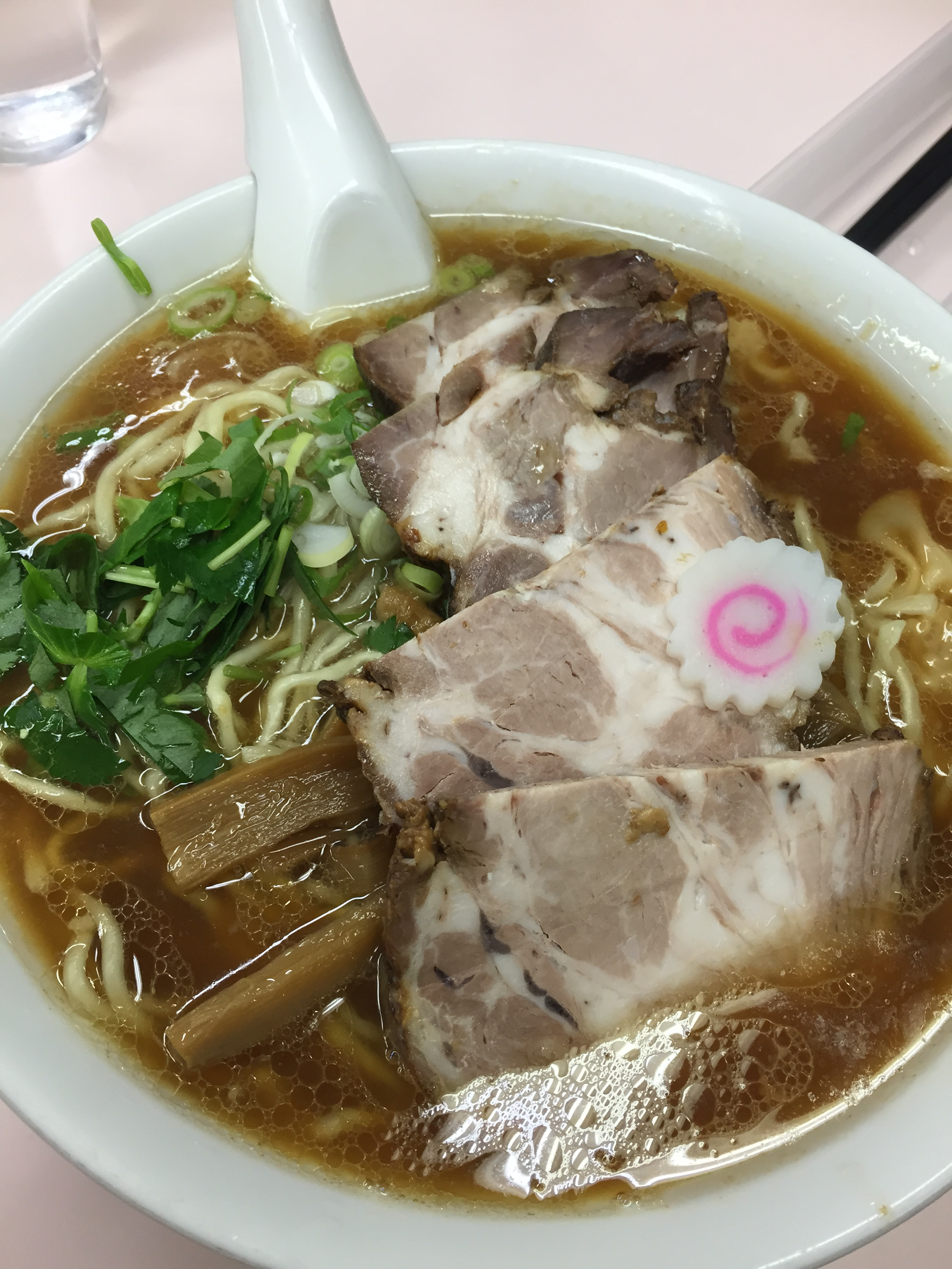 神奈川県 湯河原町 国味ラーメン 小田原系